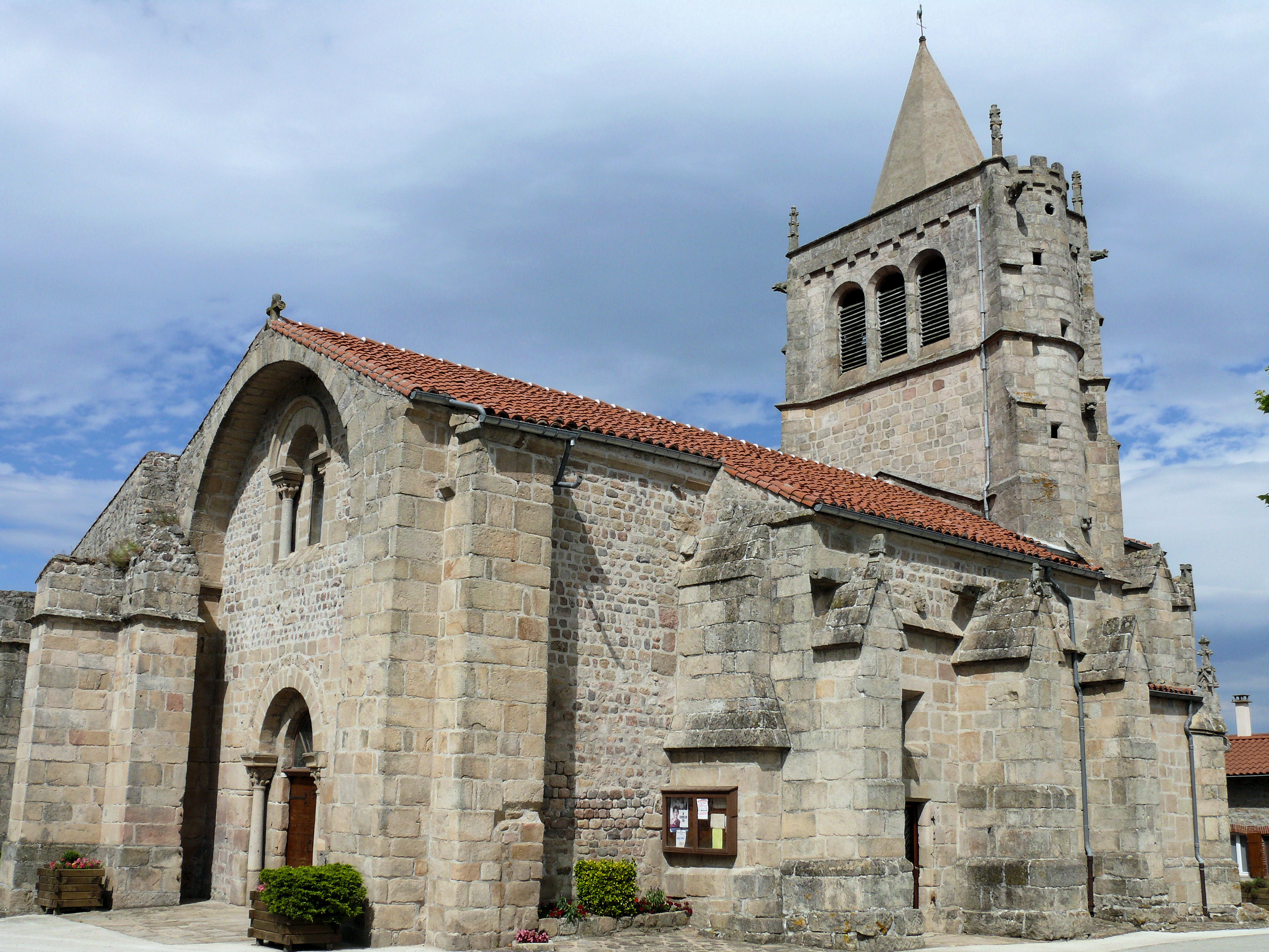 Saint-Nizier-de-Fornas - Eglise